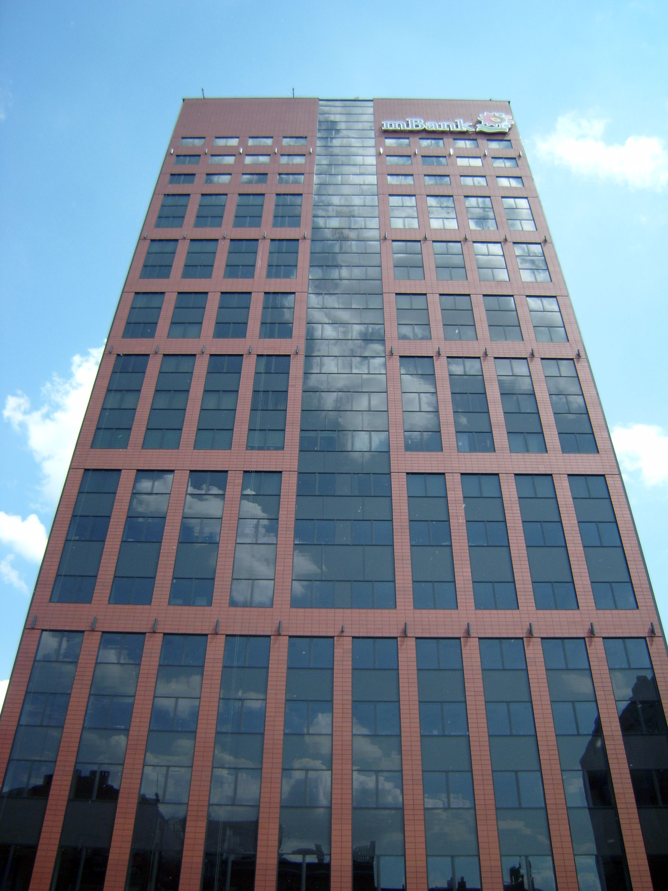 Biurowiec Red Tower w Łodzi po zakończeniu renowacji.